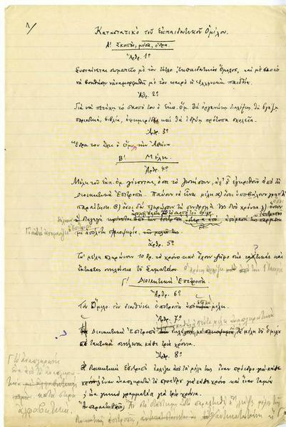 Καταστατικό του Εκπαιδευτικού Ομίλου, 11/1914